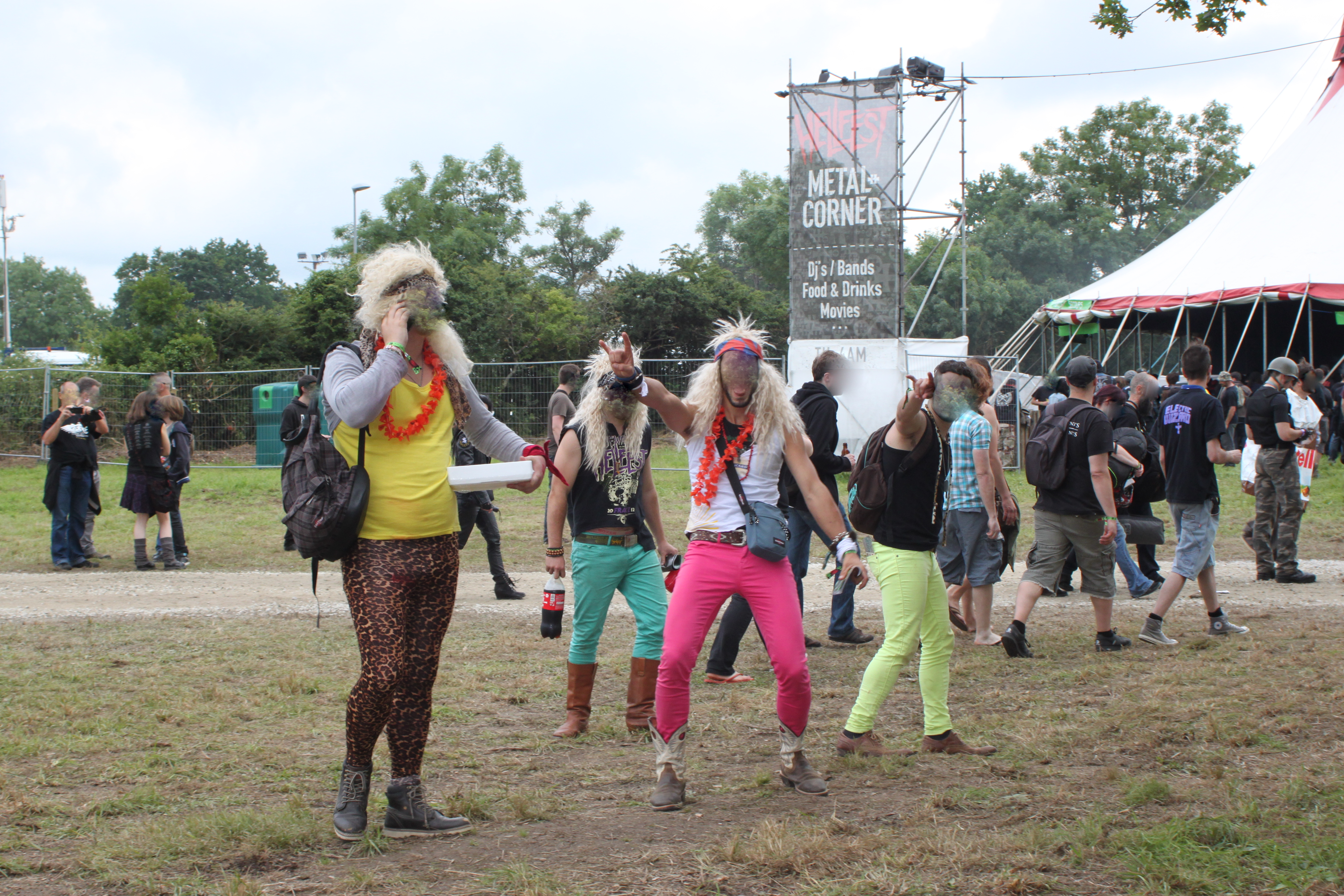 Glam-fun, Hellfest#Édition 2013|Hellfest 2013, Fr-44-Clisson.